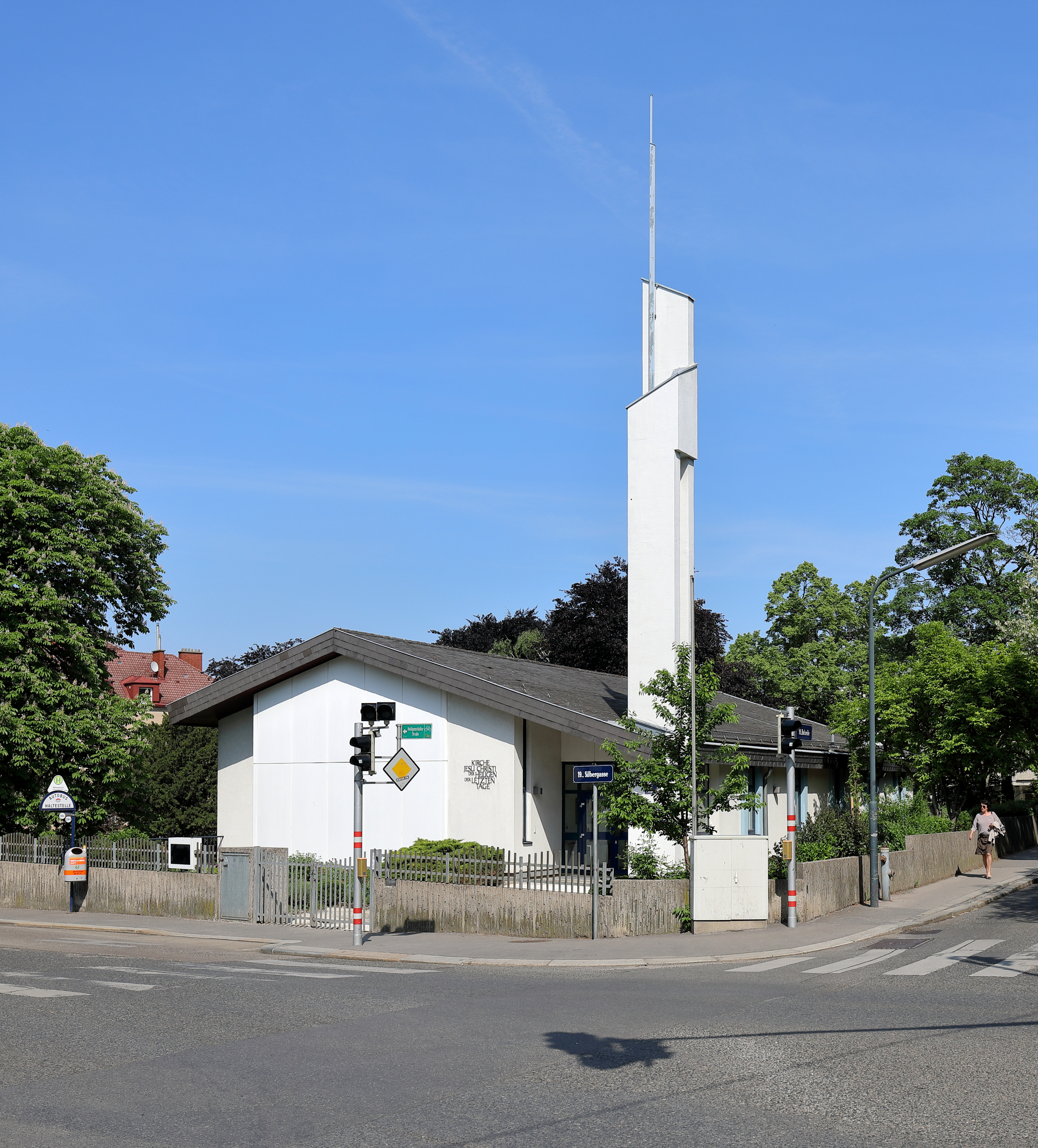 Die Mormonenkirche an der Adresse Silbergasse 2 im 19. Wiener Gemeindebezirk Döbling. Die Kirche in schlichter Betonbau-Architektur wurde um 1975 errichtet.